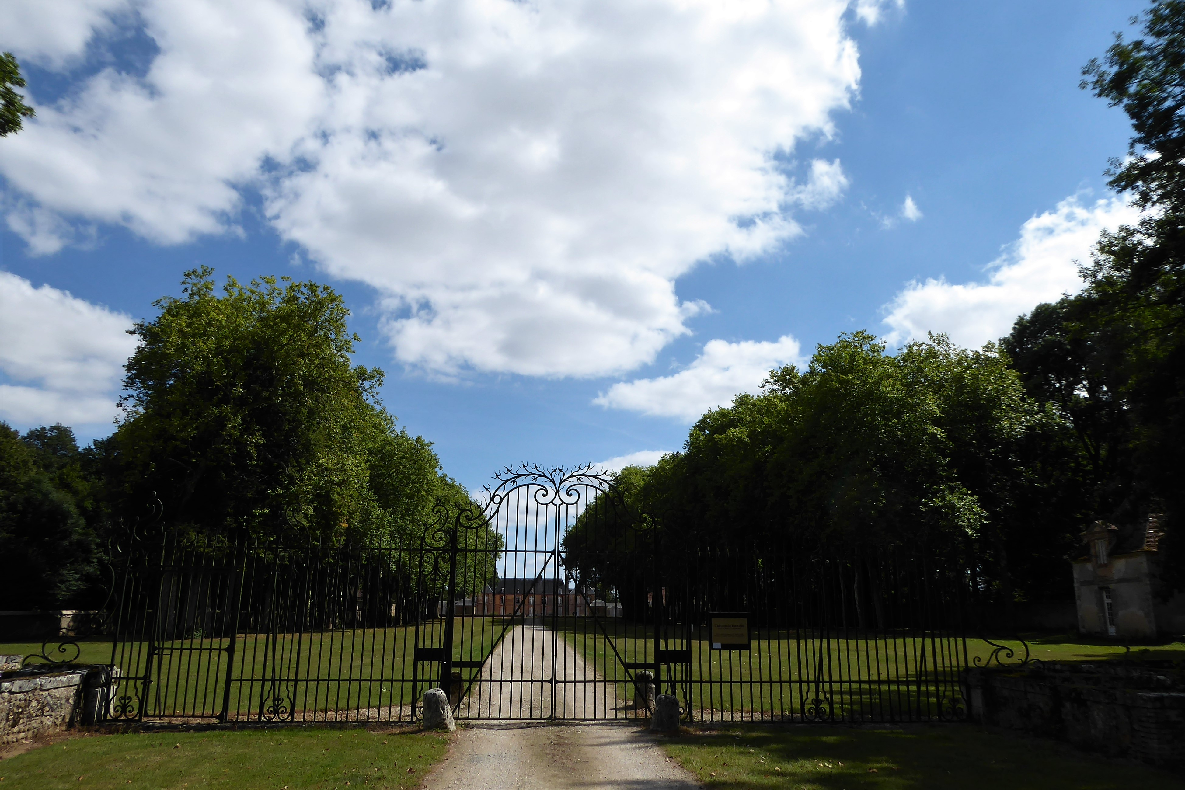 château de Blanville, Saint-Luperce, Eure-et-Loir, France.